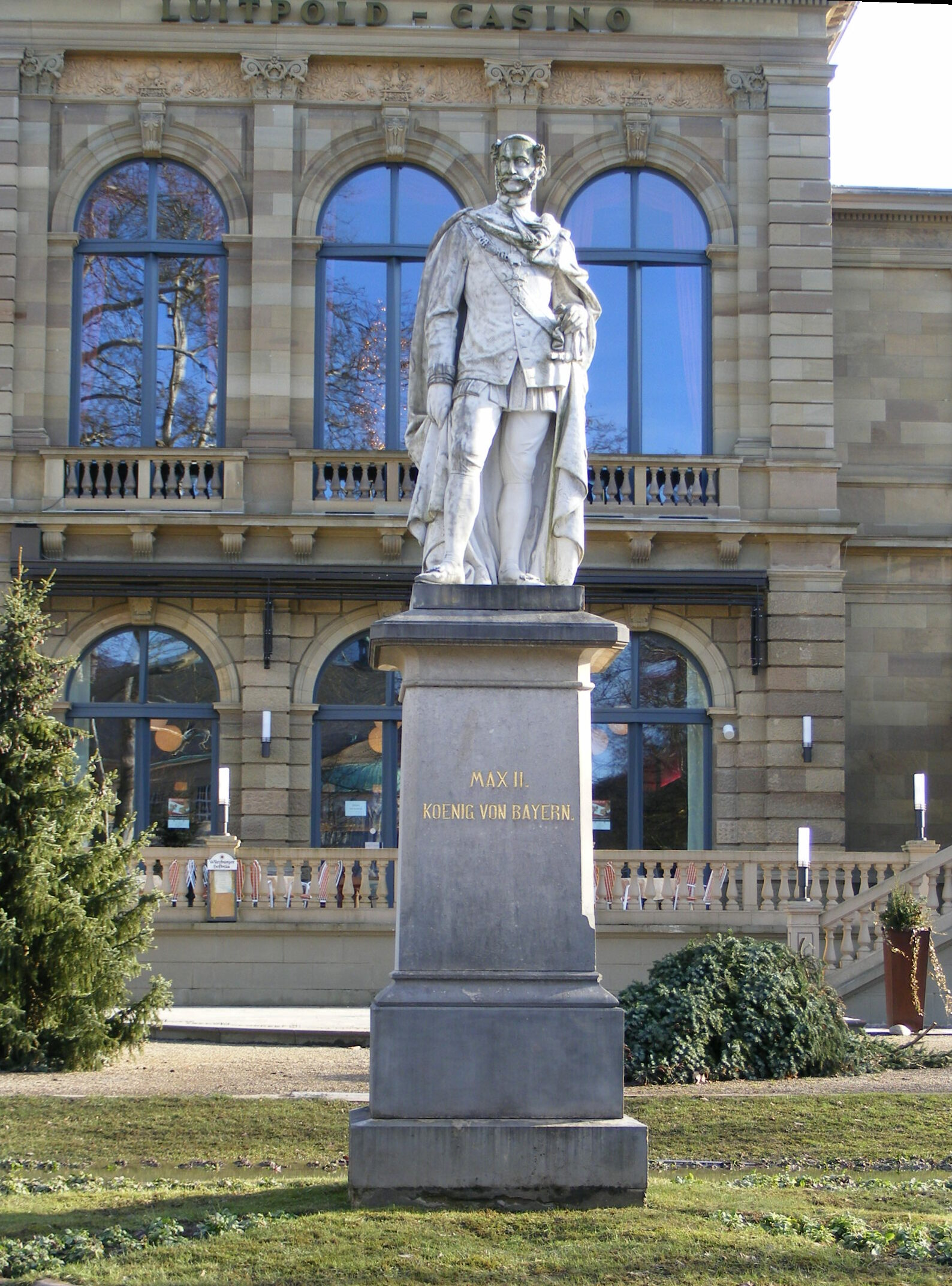 Bad Kissingen, Luitpoldpark: Statue von Maximilian II von Bayern (Inschrift: "Max II. KOENIG VON BAYERN"), Frontansicht.